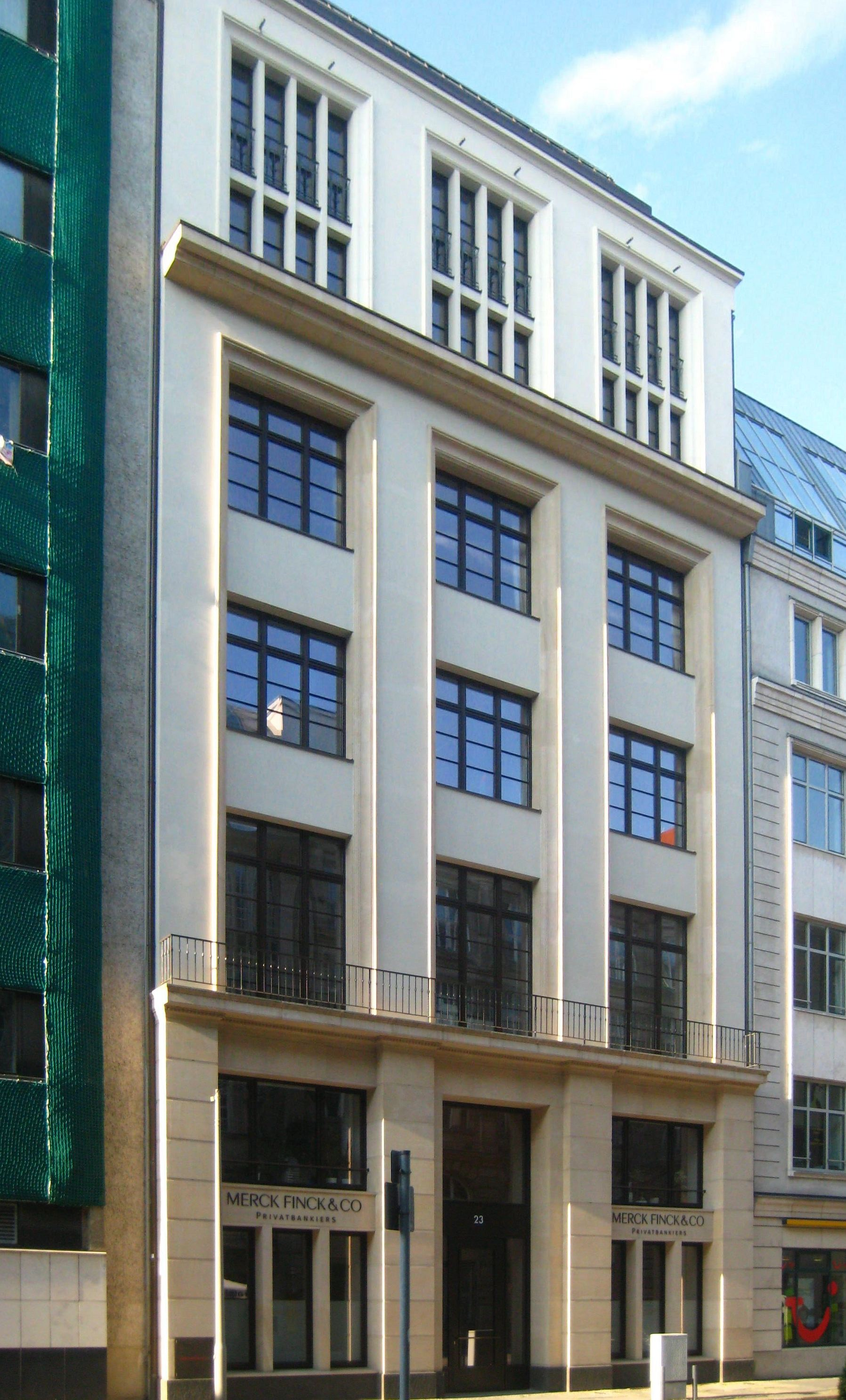 Das Bankhaus Merck, Fink & Co in der Taubenstraße 23 in Berlin-Mitte. Das um 1885 als Geschäftshaus erbaute Gebäude wurde 1924 vom Architekten Paul Zucker modern überformt. Er ersetzte Erker, Stuck und Balkone mit einer modernen Fassade; gleichzeitig wurde das Dachgeschoss zu einem Vollgeschoss ausgebaut. Im Inneren des Haus sind hingegen im Treppenhaus und mit Deckenstuck bauzeitliche Elemente erhalten geblieben. Das Gebäude ist als Baudenkmal gelistet.